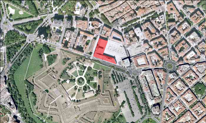 Imagen de satélite de la situación del Baluarte, Palacio de Congresos y Auditorio de Navarra